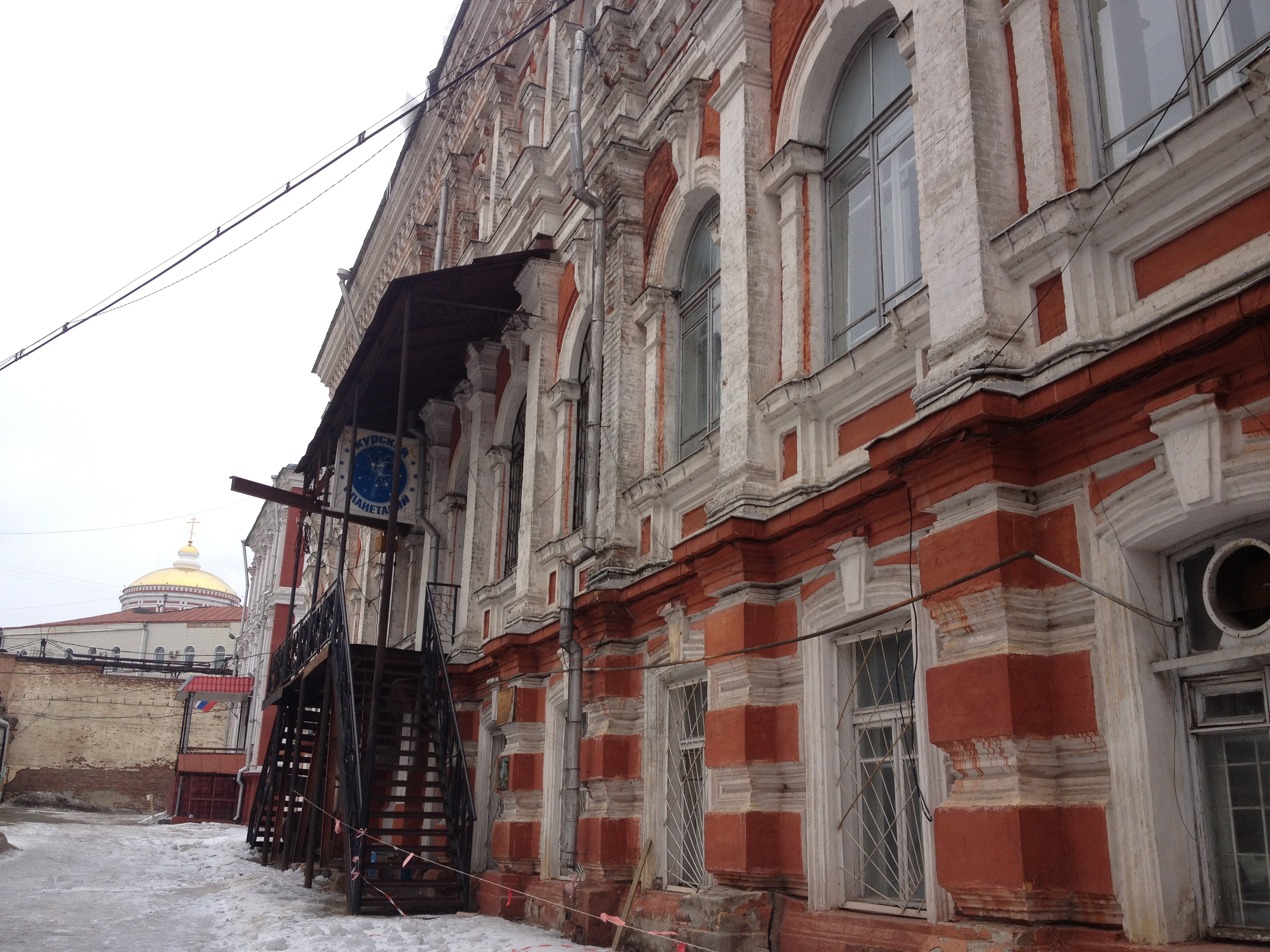 г. Курск